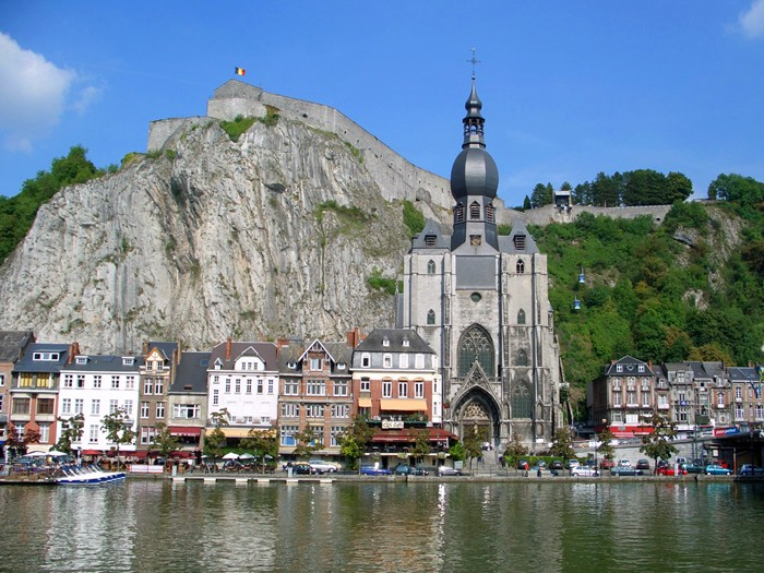 Dinant